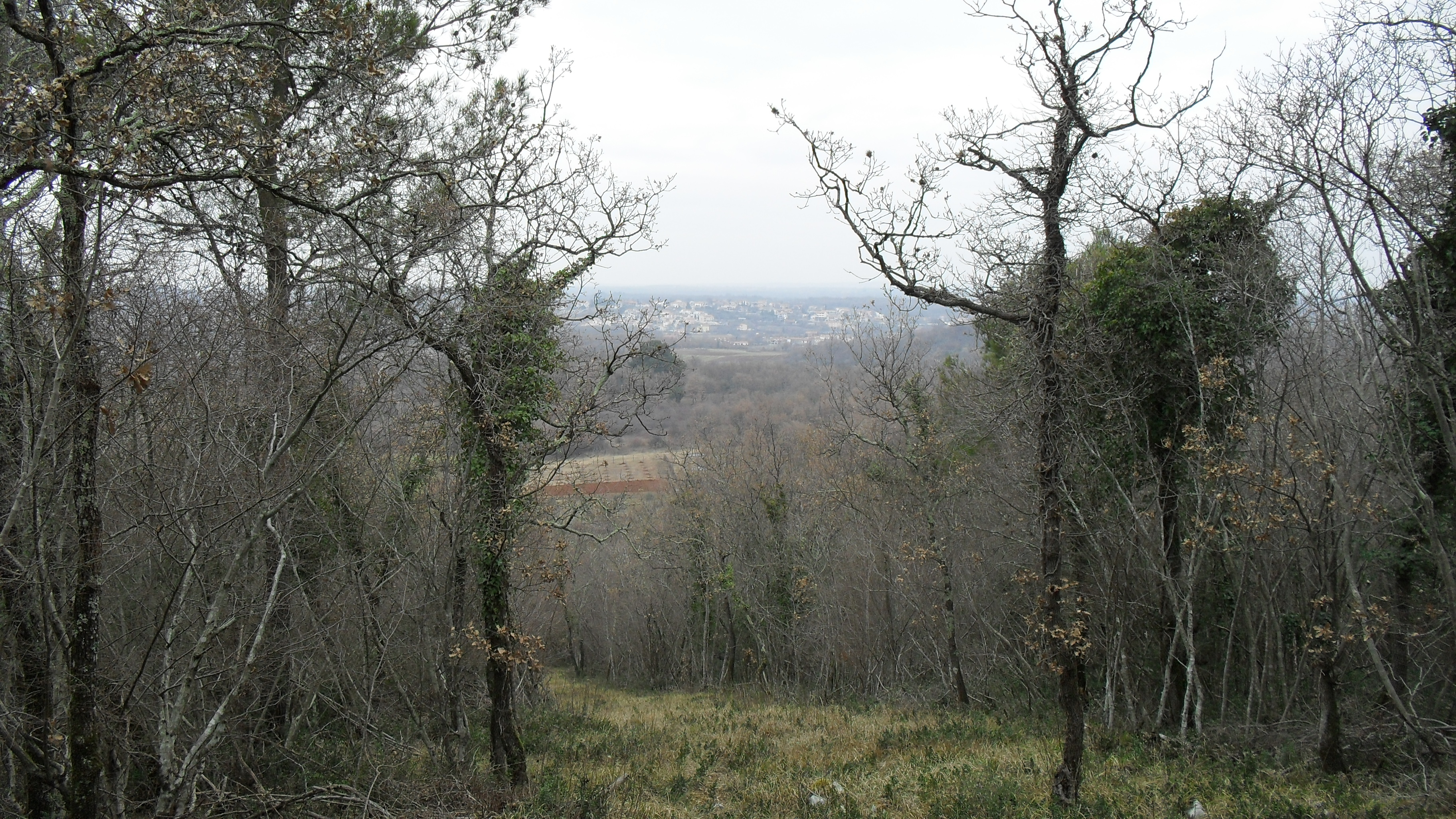 spuštanje, pogled musalez/valkarin